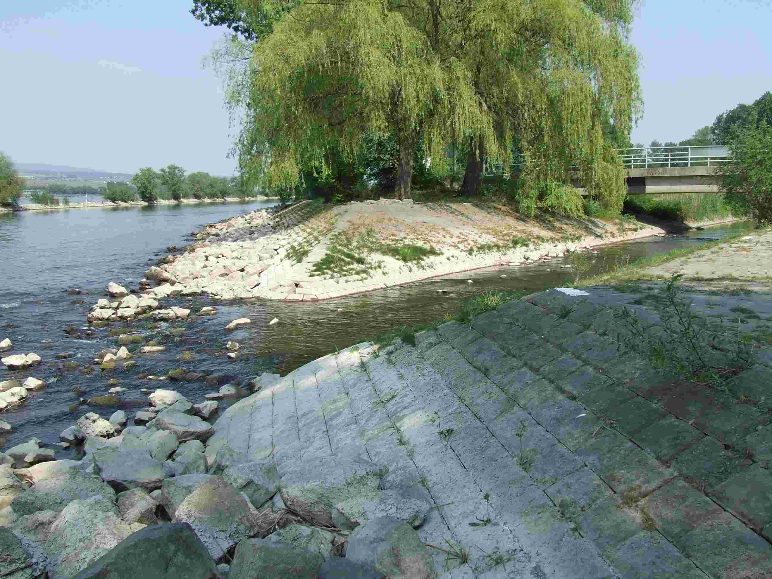 Selz hier die Mündung in den Rhein bei Ingelheim am Rhein